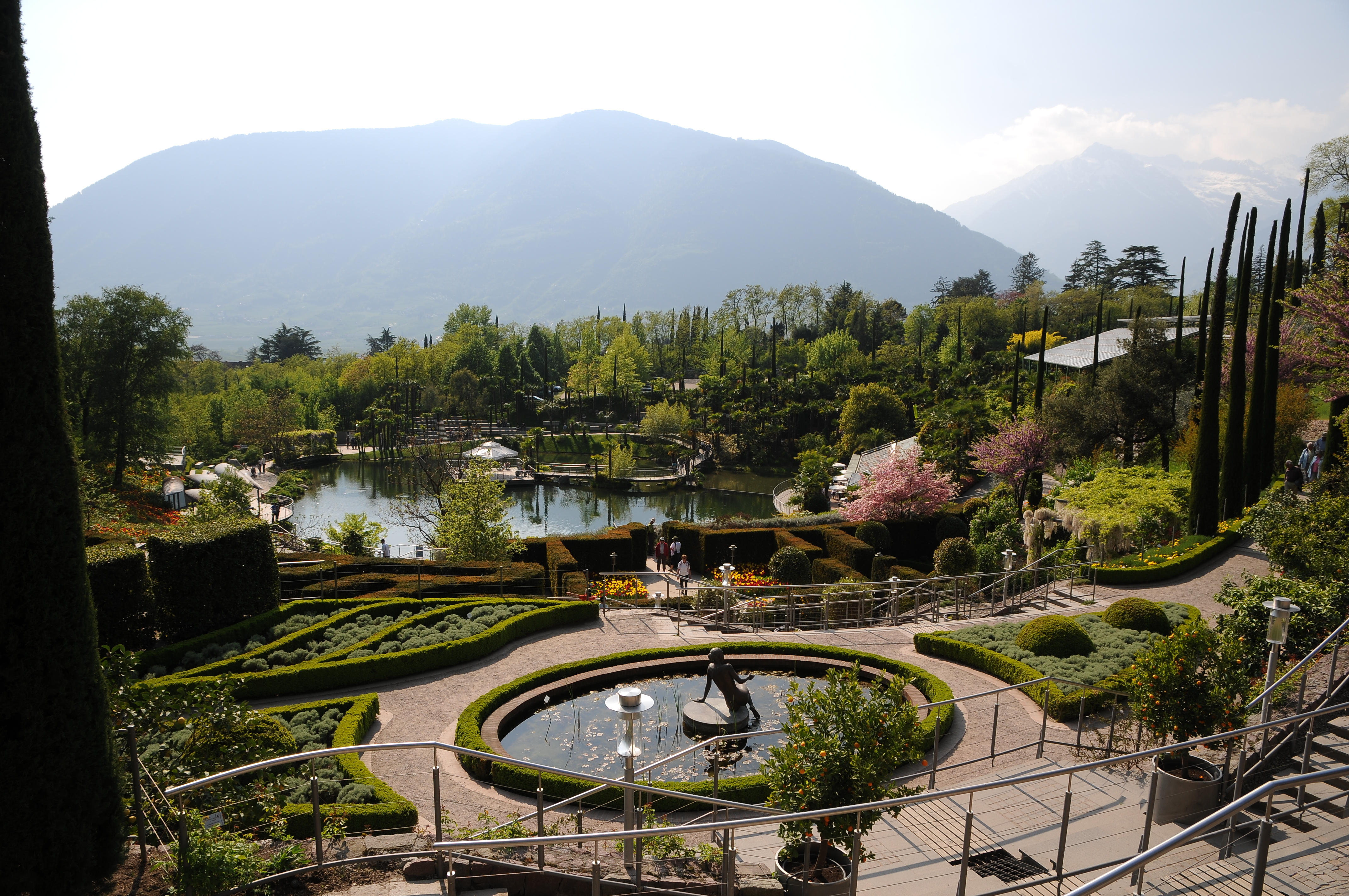 Die Gärten von Schloss Trauttmansdorff liegen am östlichen Stadtrand von Meran in Südtiro /Italien. Der nach seinem Wahrzeichen – Schloss Trauttmansdorff – benannte botanische Garten der Kurstadt Meran nimmt eine Fläche von rund zwölf Hektar ein.